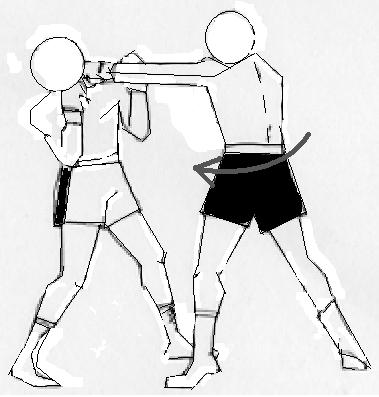 made by stekes sweden